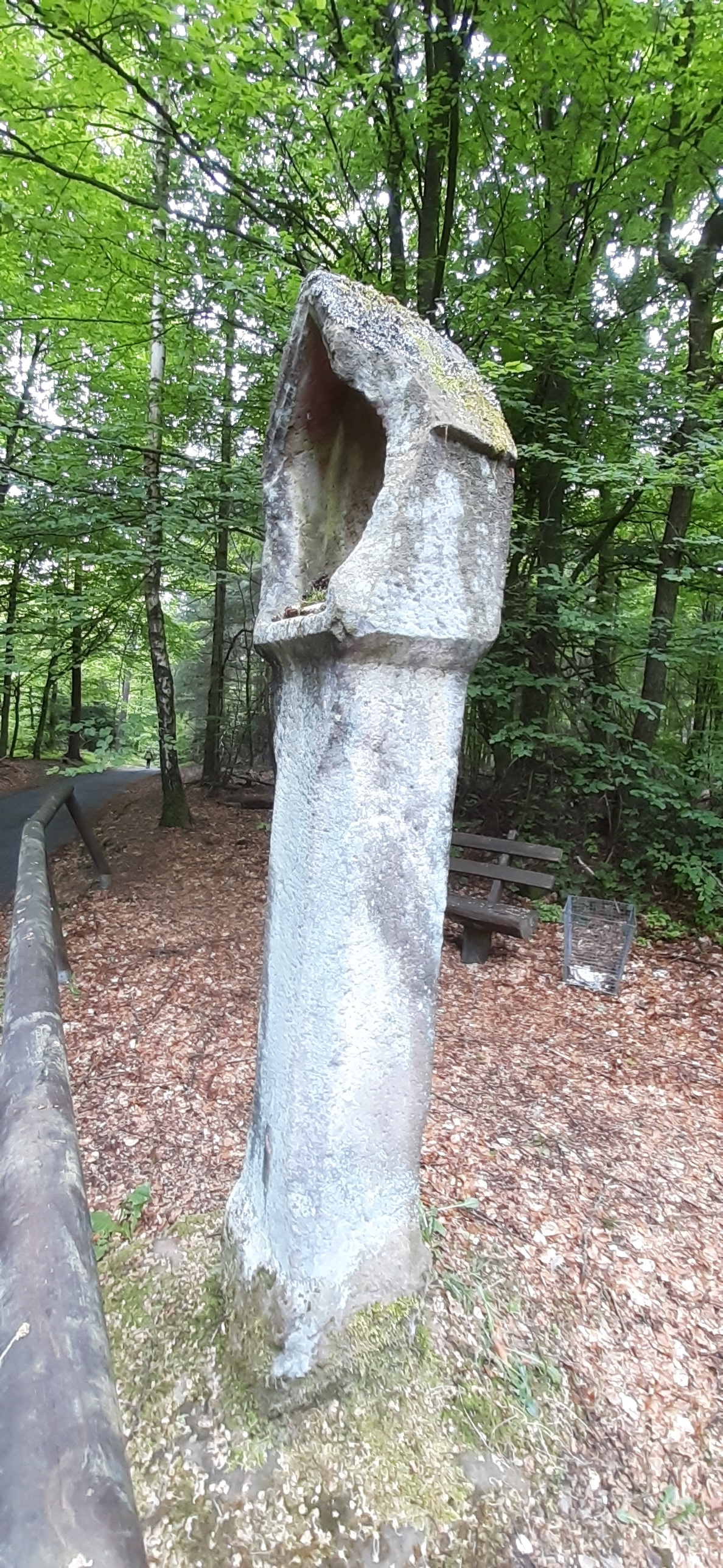 Olfener Bild, Vorderansicht